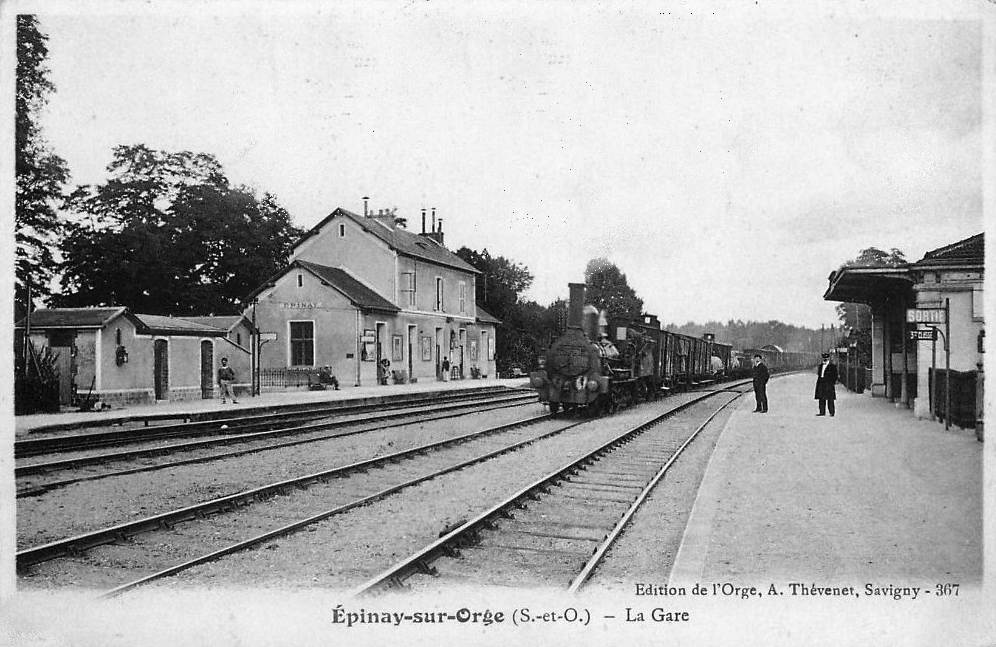 Intérieur de la gare d'Épinay-sur-Orge vers 1900.